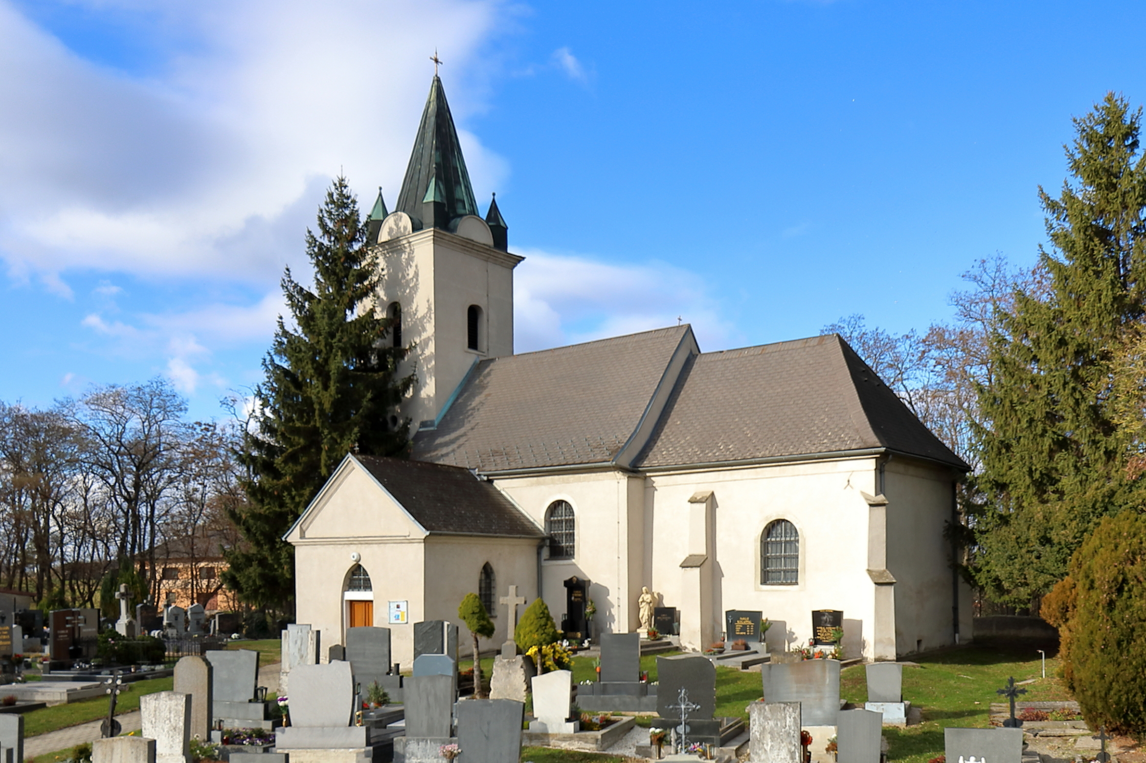 Südostansicht der röm.-kath. Pfarrkirche hl. Markus in der burgenländischen Gemeinde Potzneusiedl.Die im Kern mittelalterliche ehemalige Wehrkirche wurde in erhöhter Lage errichtet und ist von einem Friedhof umgeben. Der quadratische Westturm hat einen Steinpyramidenhelm mit Eckpyramiden.